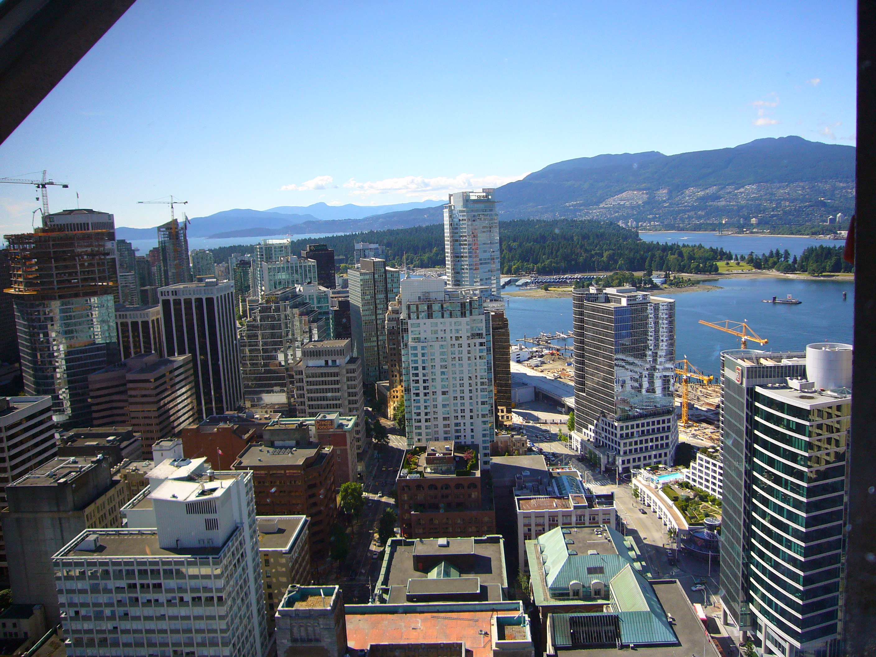 Photo de grands immeubles en construction à Vancouver (Canada) prise de la Lookout Tower en juillet 2006.